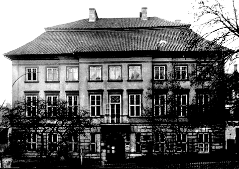 Königsberg, Schiefer Berg 12, Dönhoffsches Stadtpalais in Königsberg